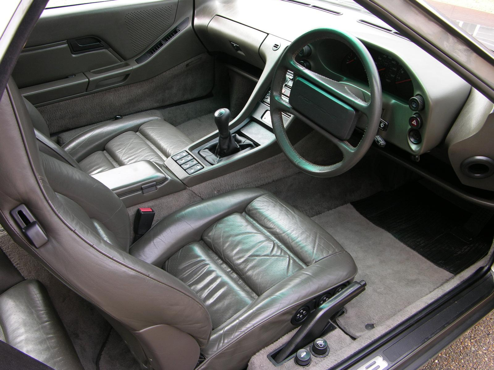 1987 Porsche 928 S4